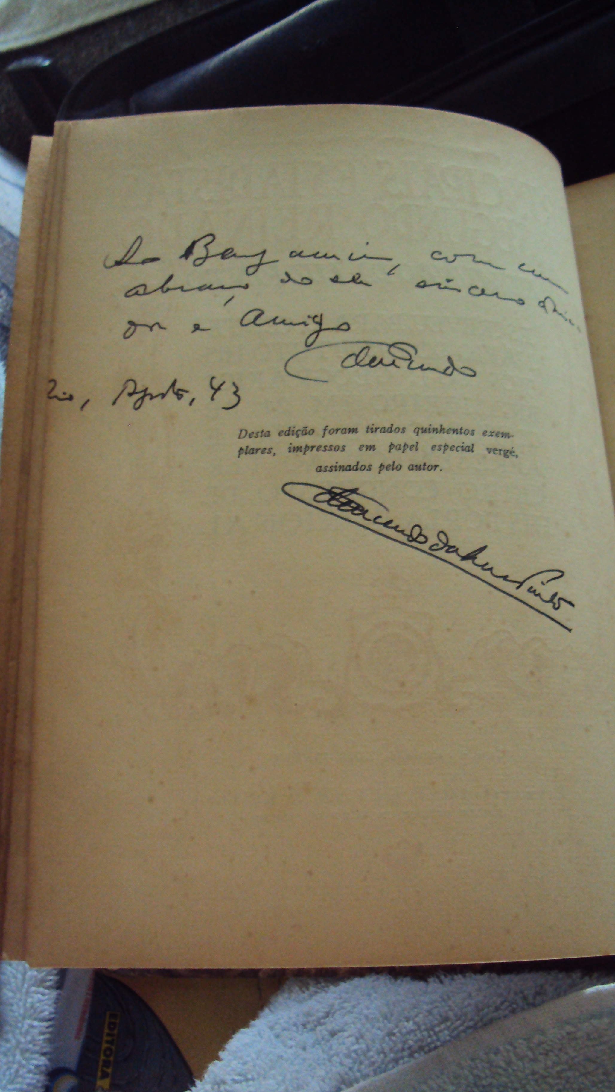 Dedicatória aposta ao livro Principais Estadistas do Segundo Reinado, 1943. "Ao Benjamim, com um abraço dele sincero ? e amigo Edmundo. Rio, agosto 43